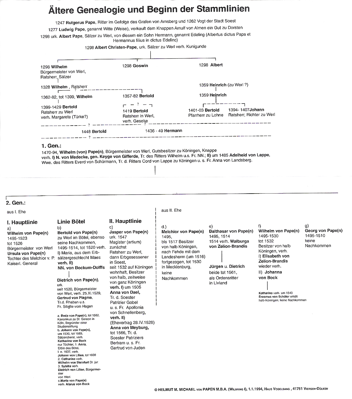 Stammtafel der Familie von Papen ältere Genealogie